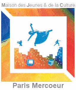 Logo de l'Association MJC Paris Mercoeur